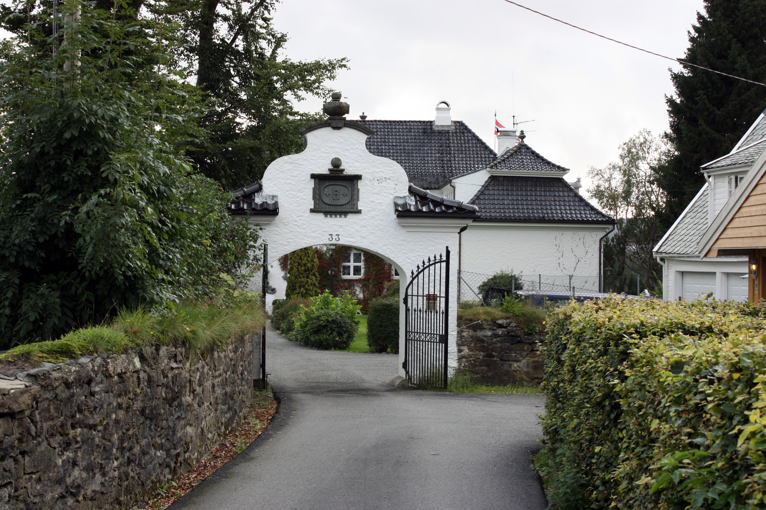 Frants Beyers veg 33, Fana, Bergen.